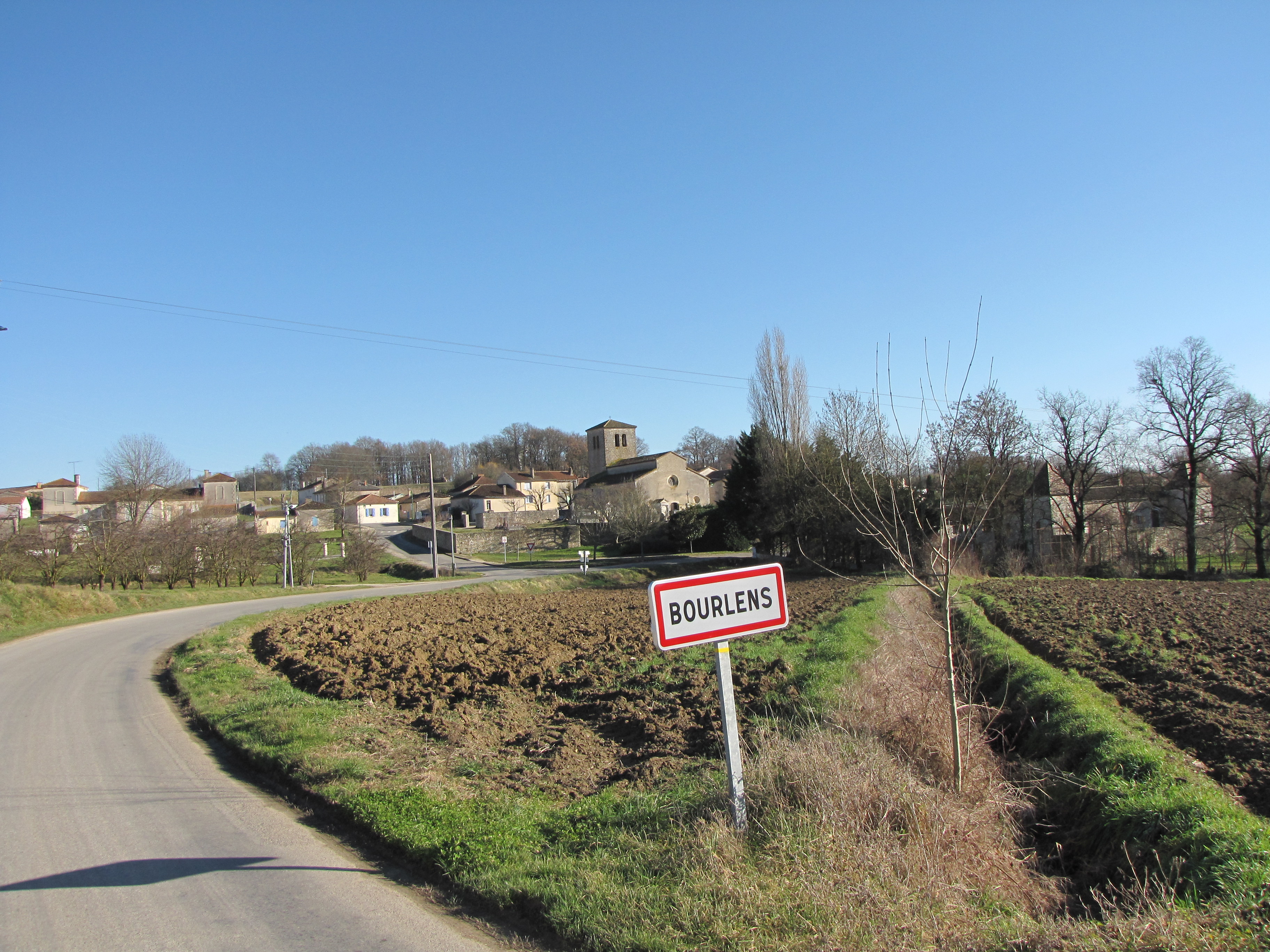 Bourlens